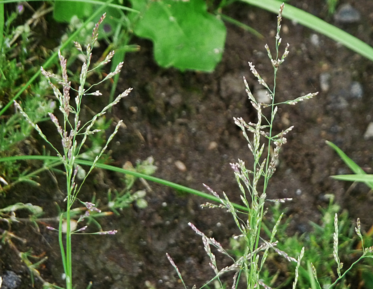 Gewöhnlicher Salzschwaden in Zwiesel